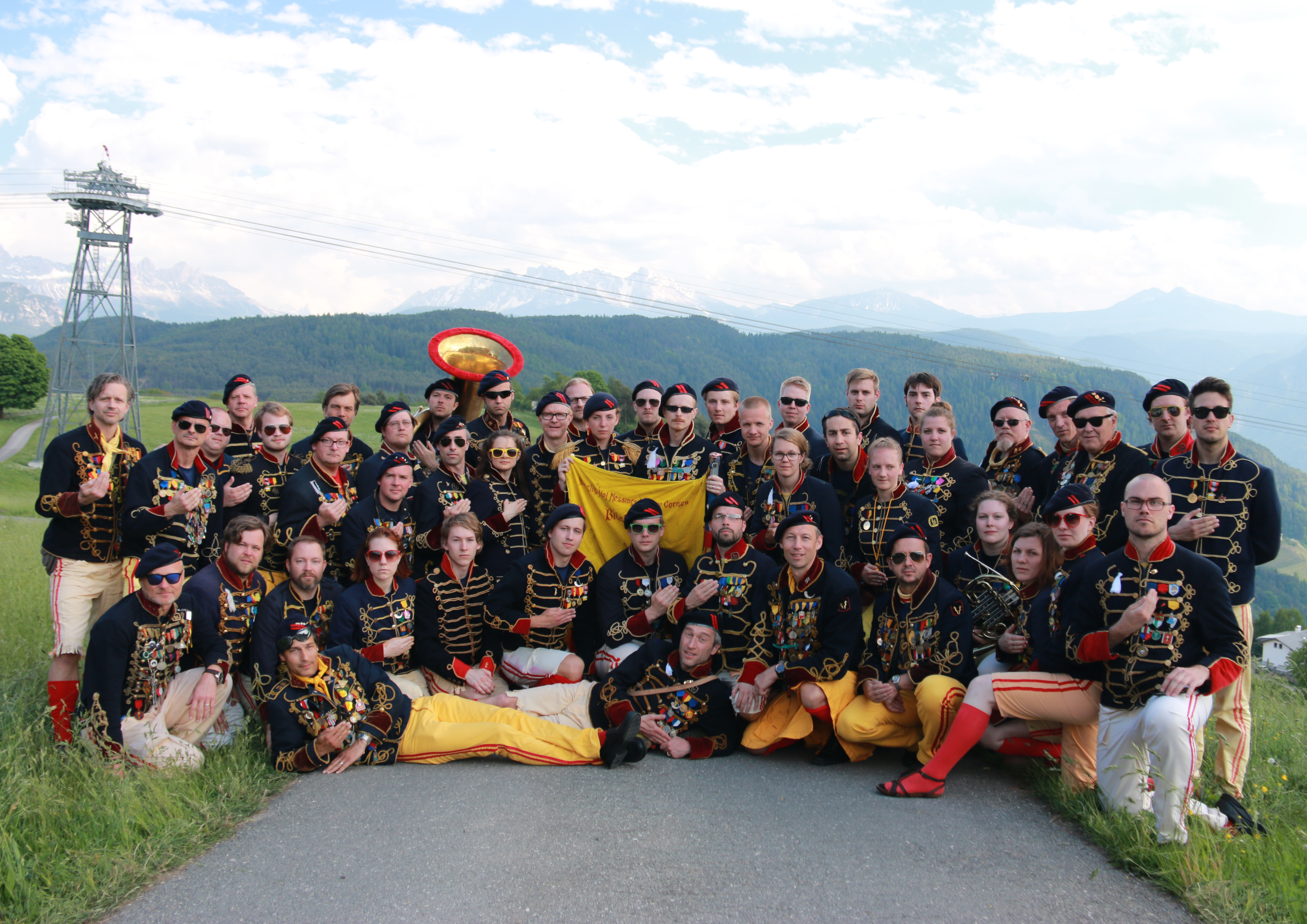 Group photo of Blåshjuden